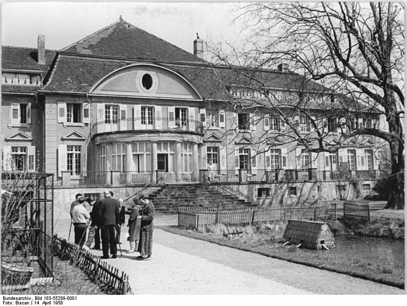 Bahrendorf, Schloss als Krankenhaus Zentralbild Biscan 14.5.1958 Gutsbesitzer-Schloss wurde Krankenhaus. Das Schloss des ehemaligen Rittergutsbesitzer Schaffer in Bahrendorf, Kreis Wanzleben, wurde nach 1945 in ein Krankenhaus umgewandelt. Nach und nach wurde ausgebaut, in der letzten Zeit durch Errichtung einer Entbindungsstation und einer Schwerkrankenstation. Heute ist es als Kreiskrankenhaus und Landambulatorium eine der schönsten und besten Einrichtungen des Gesundheitsdienste im Bezirk Magdeburg. UBz: Schloss Bahrendorf, das nicht mehr einer Familie von Nichtstuern gehört, sondern als Krankenhaus und Landambulatorium der Bevölkerung des Landkreises dient.